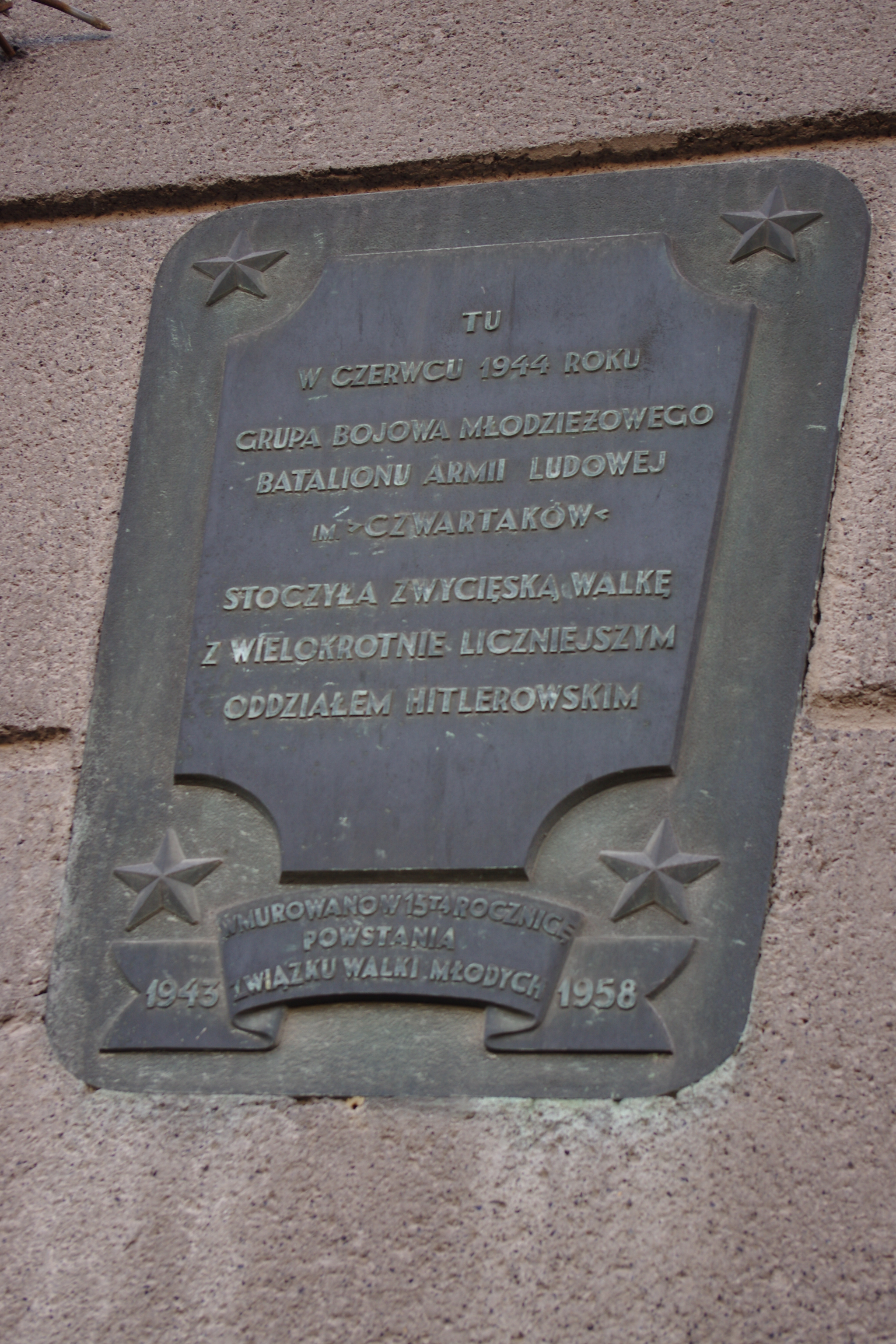 Tablica upamiętniająca akcję bojową Batalionu im. Czwartaków, w czerwcu 1944 r., na budynku PAST-y w Warszawie